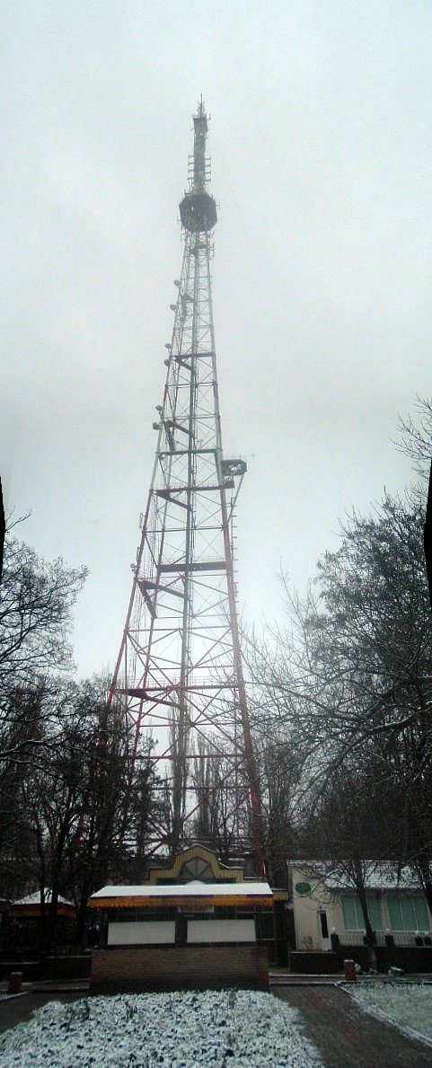 TV antena, Lugansk, Ukraine.